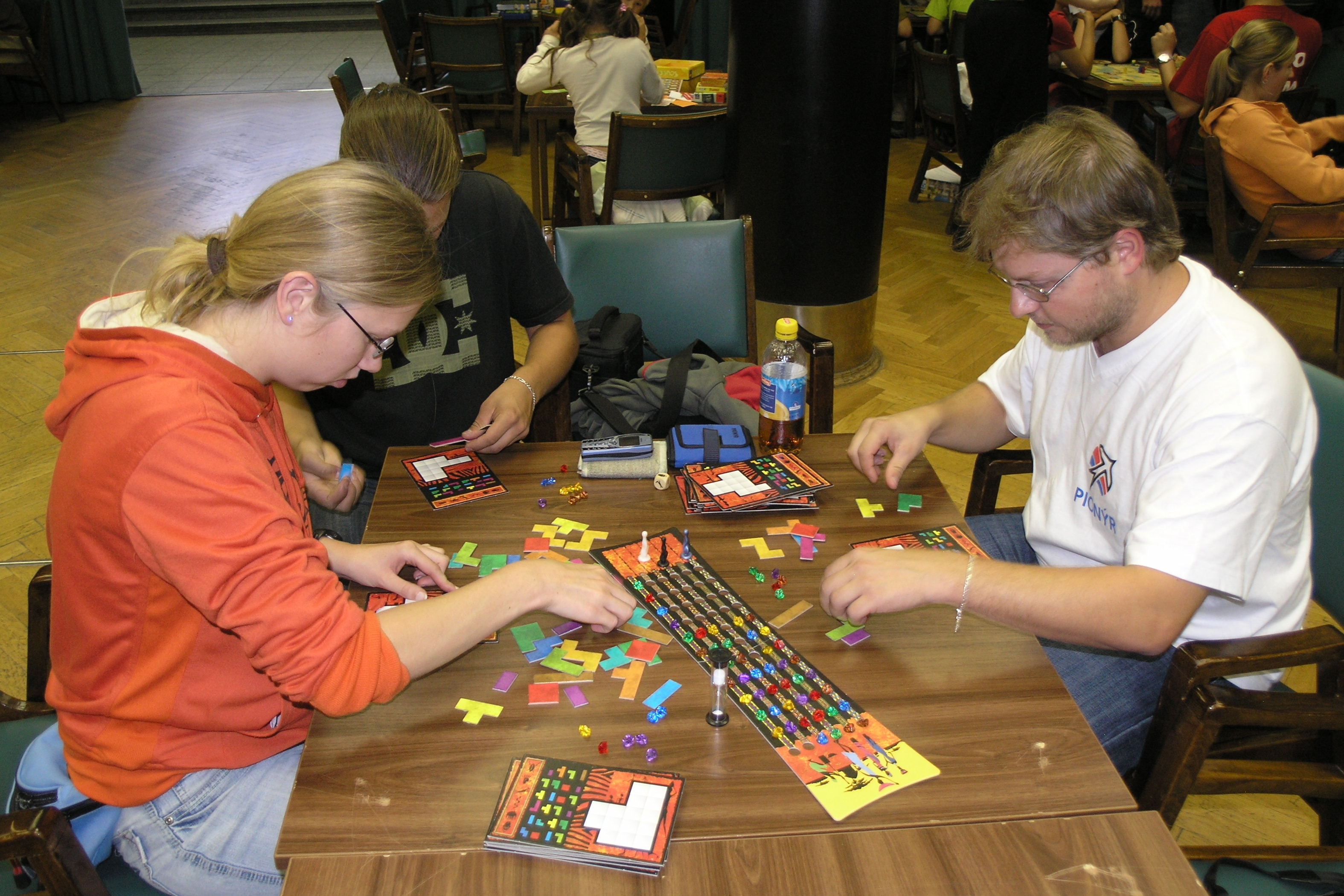 Hry a hlavolamy 2008 - festival her a hlavolamů v Praze, Holešovicích